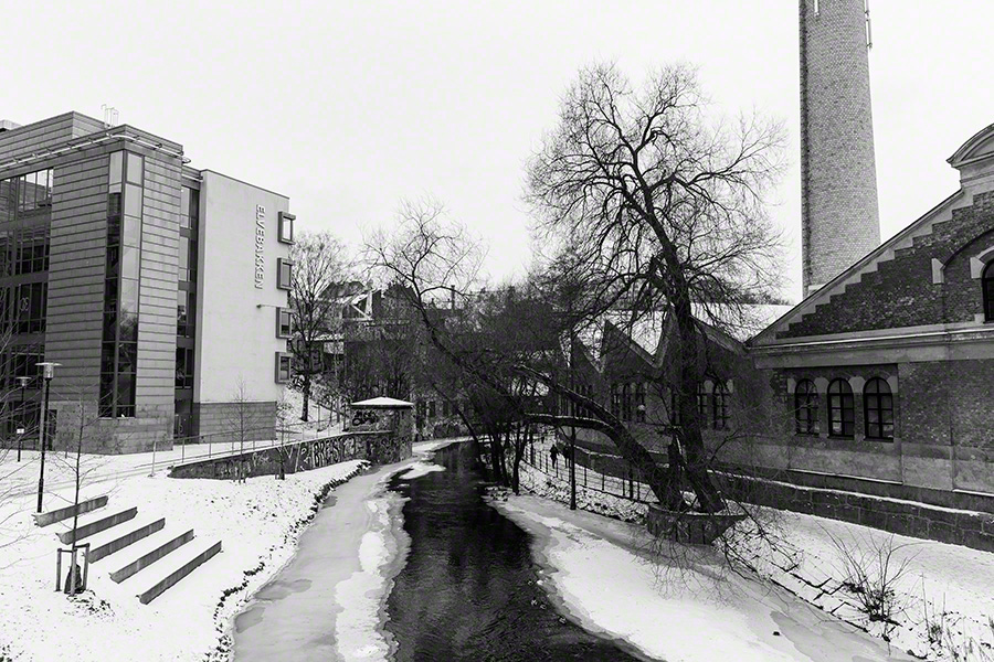 Elvebakken skole i januar 2016